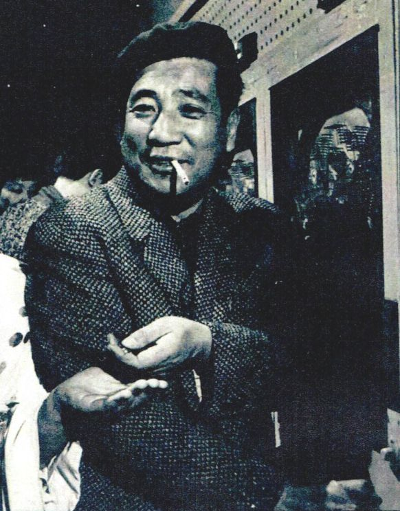 編集プロダクション映芸『映画芸術』第15巻第8号（1967）より野口晴康